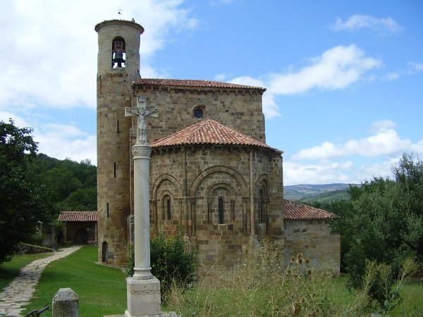 Colegiata de San Martín de Elines, en Valderredible, Cantabria (España)